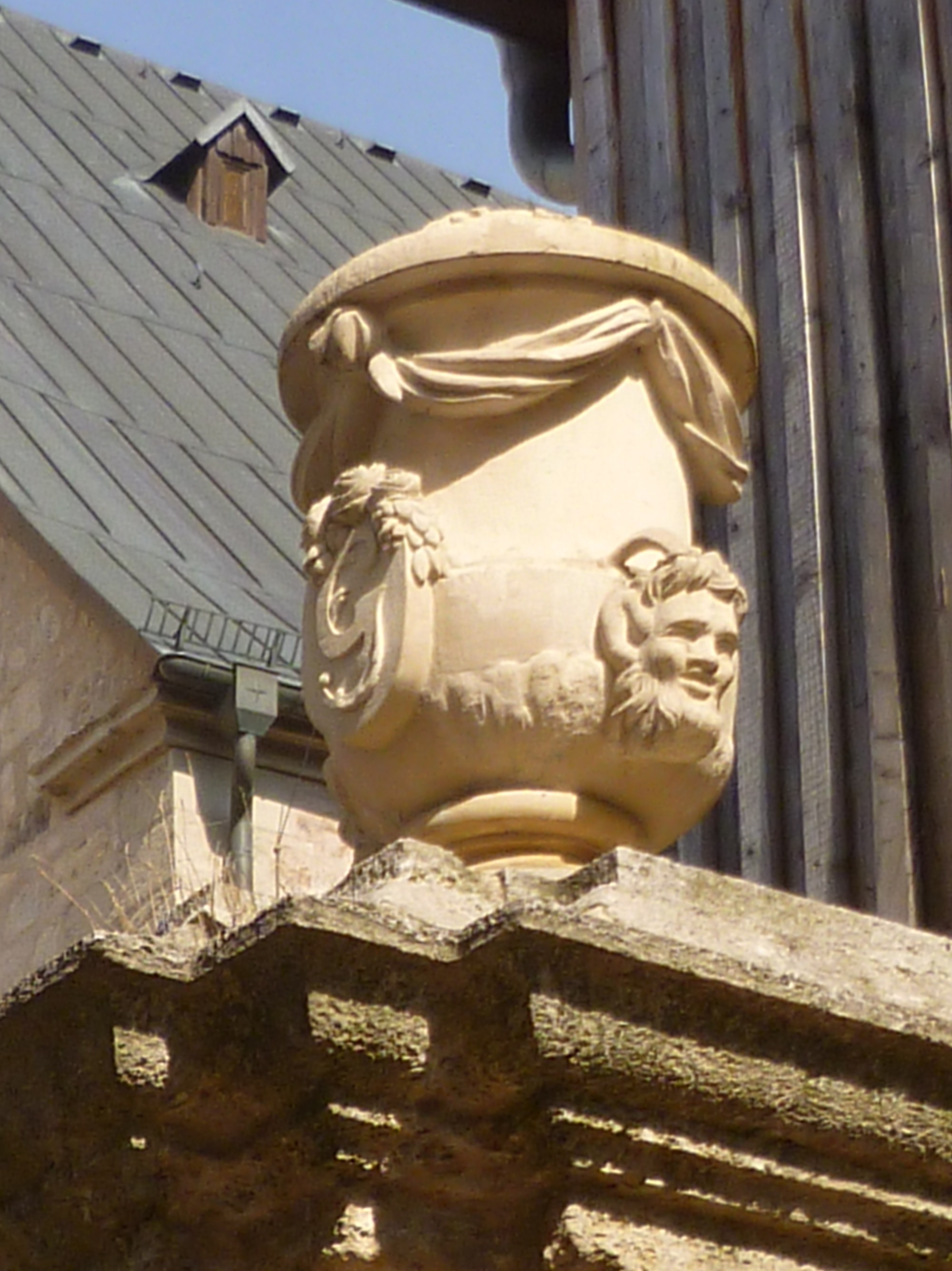 Detail, Gottschalcksches Haus in Sondershausen/Thüringen - ehemaliges Stadtpalais